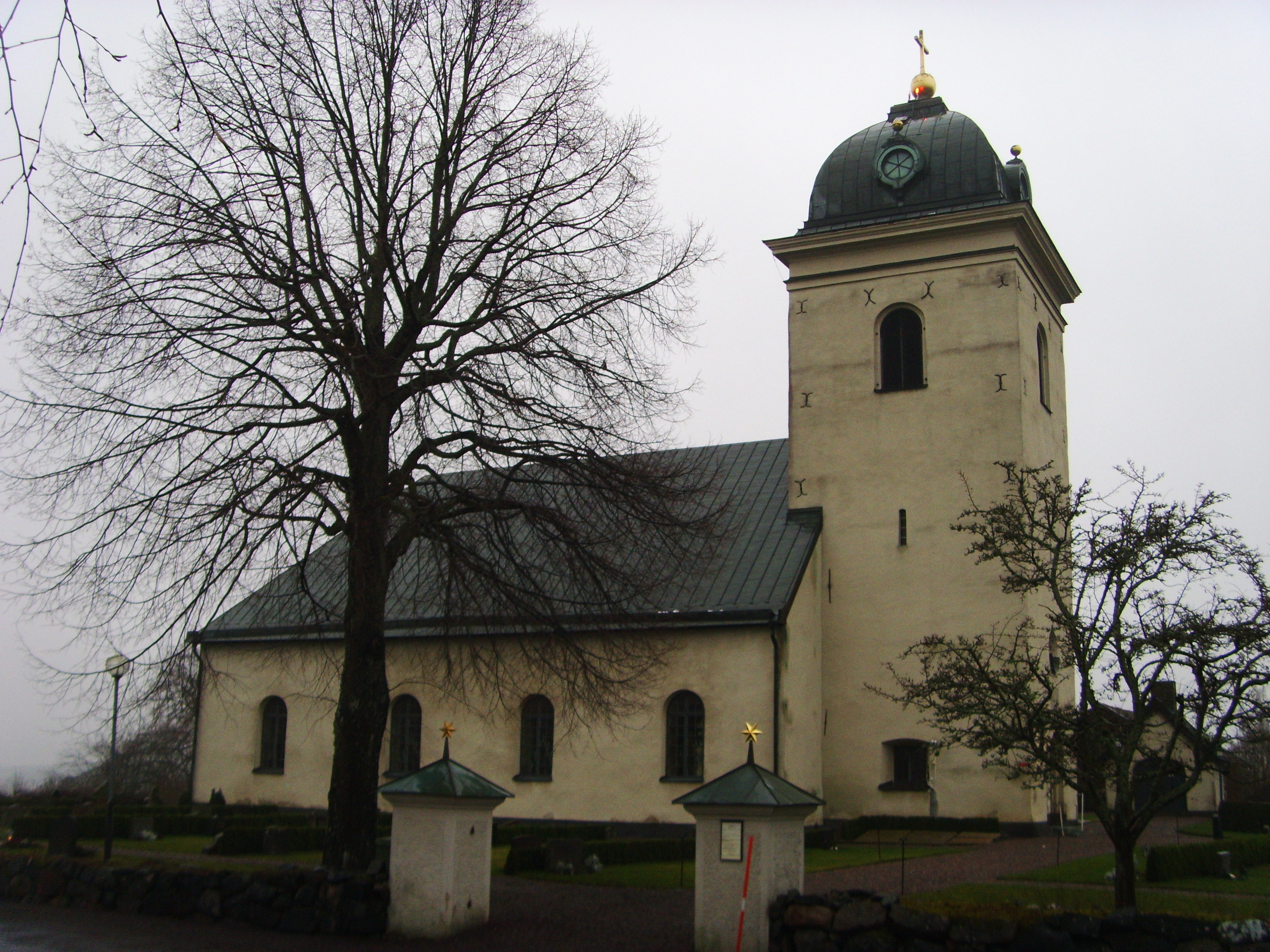 Dagsbergs kyrka i Linköpings stift.